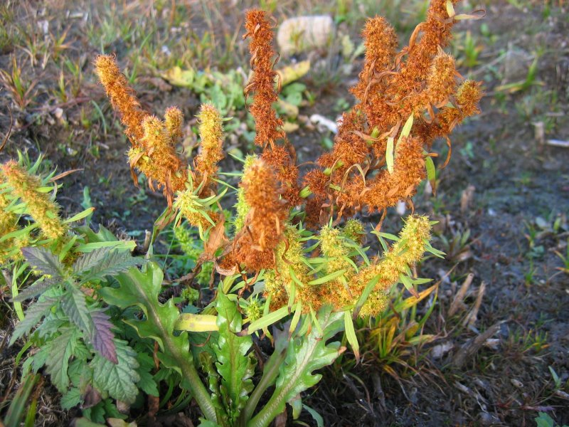 Habitus des Rumex maritimus